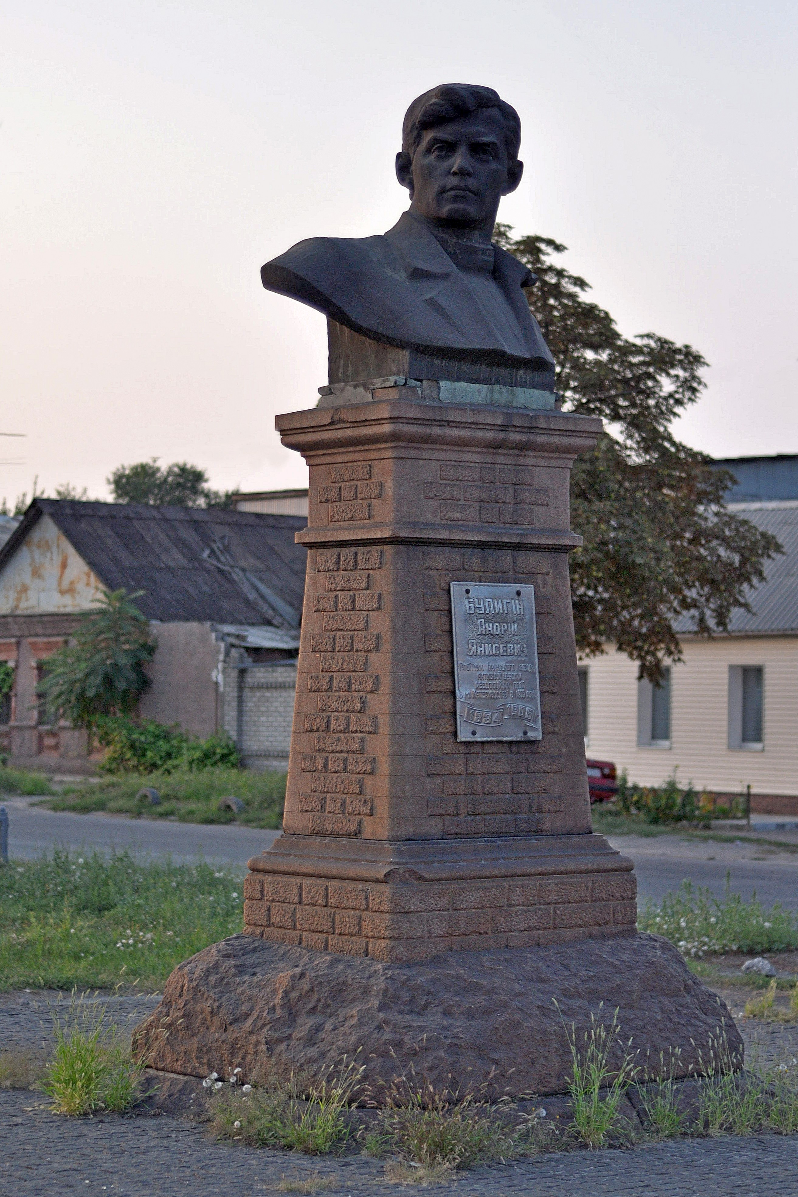 Пам'ятник Булигіну А.Я. (1884-1906) -активному учаснику першої російської революції у Катеринославі (1905 р.), Дніпропетровськ, Булигіна вул., 3